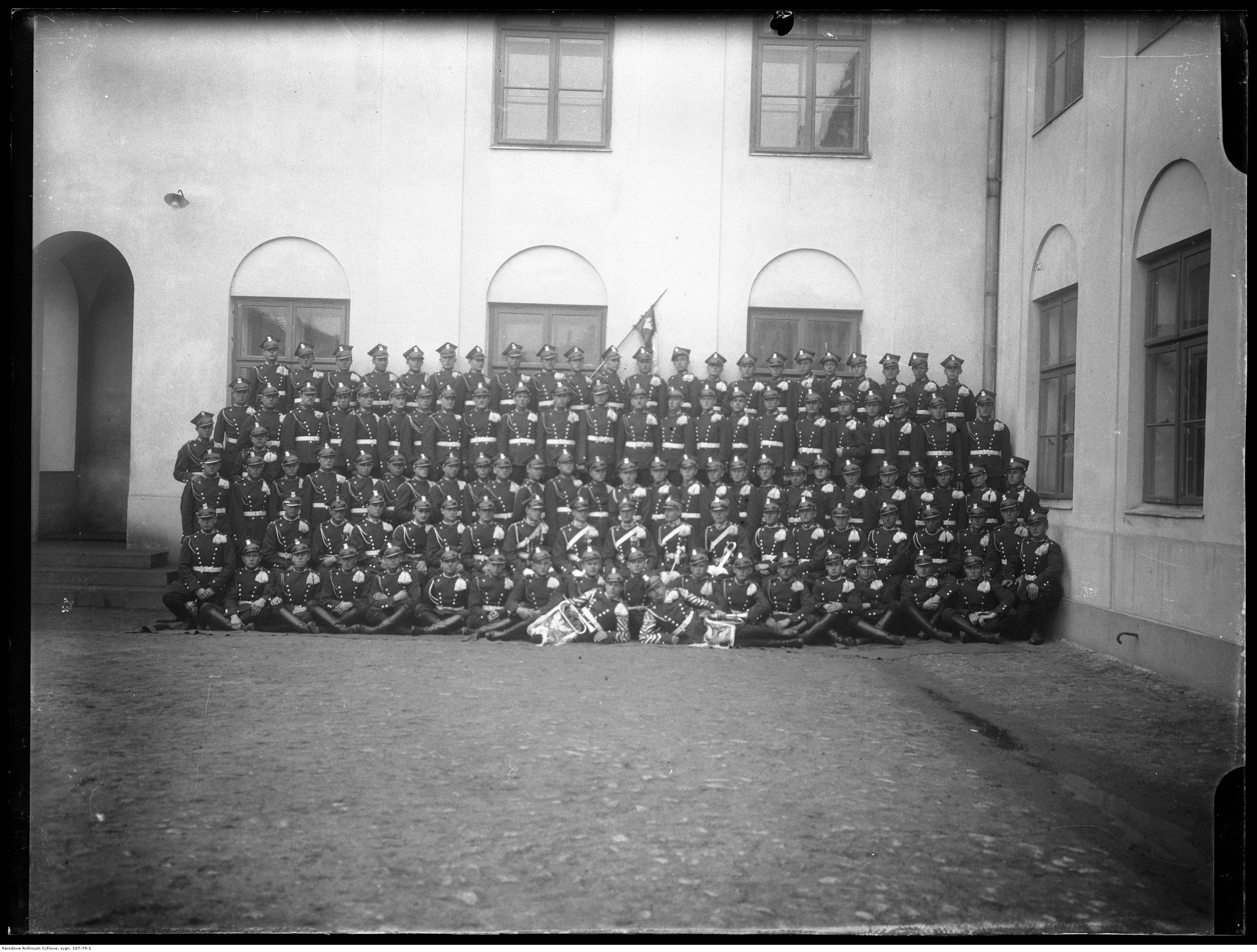 Grupa całego szwadronu z wachmistrzem Witaczyńskim